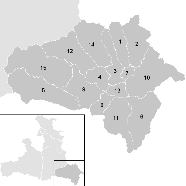 Leere Karte mit den Gemeinden im Österreichischen Bezirk Tamsweg